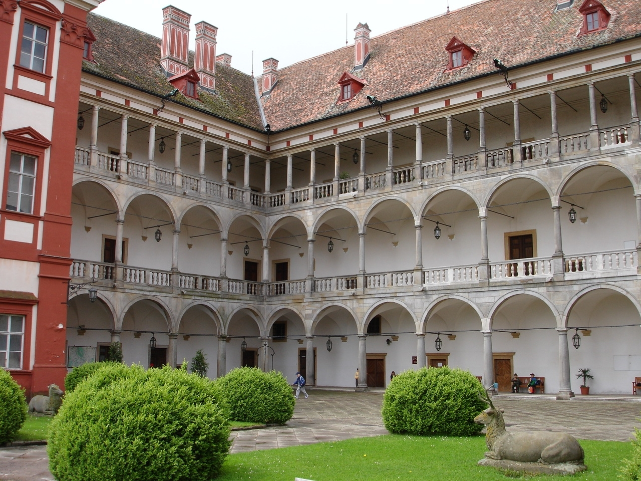 Schloss Opocno